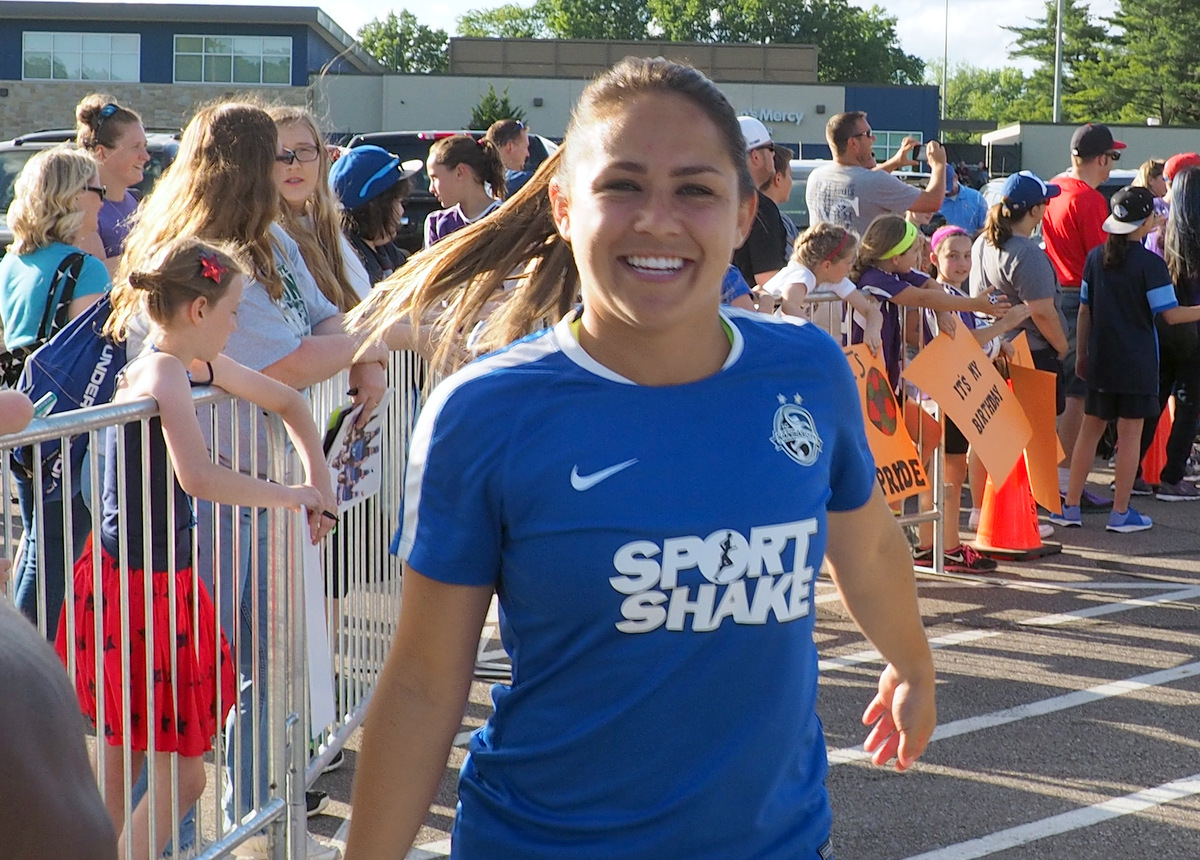 FCKC vs ORLANDO 5-28-16